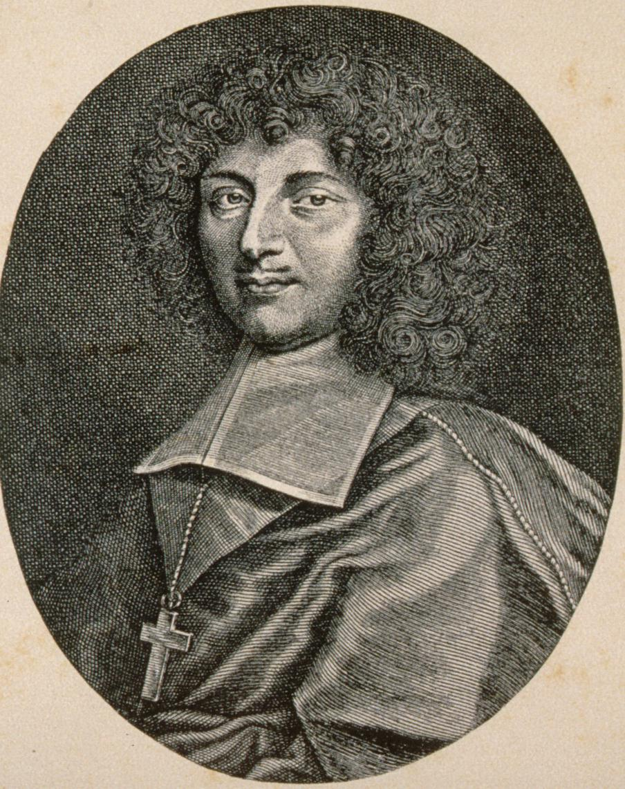 Guillaume Egon de Furstenberg , 81e Évêque de Strasbourg en 1682, Cardinal en 1686 (1629-1704) Buste, 3/4 à g., en médaillon ovale (1680?)